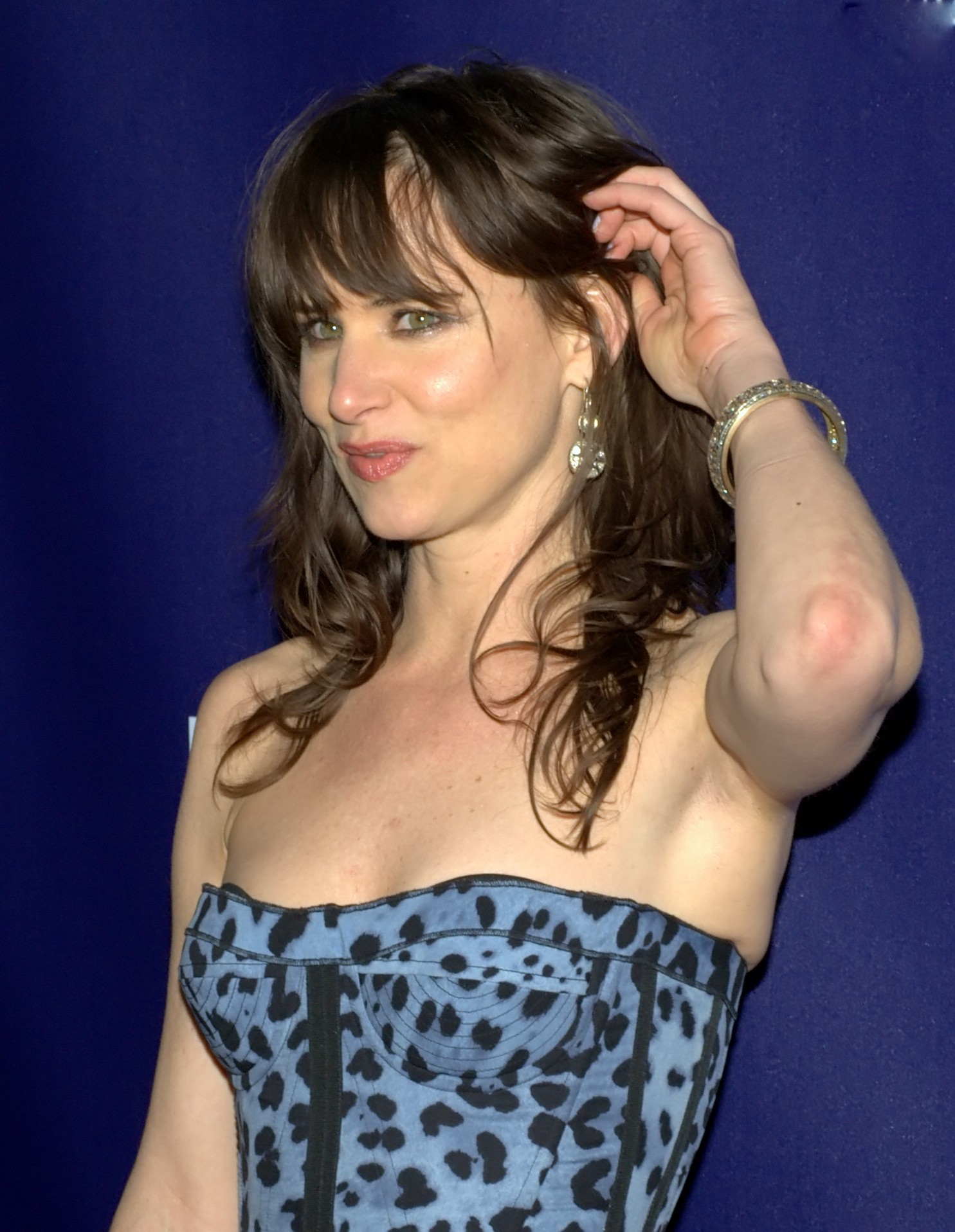 Juliette Lewis, NYC, 2010